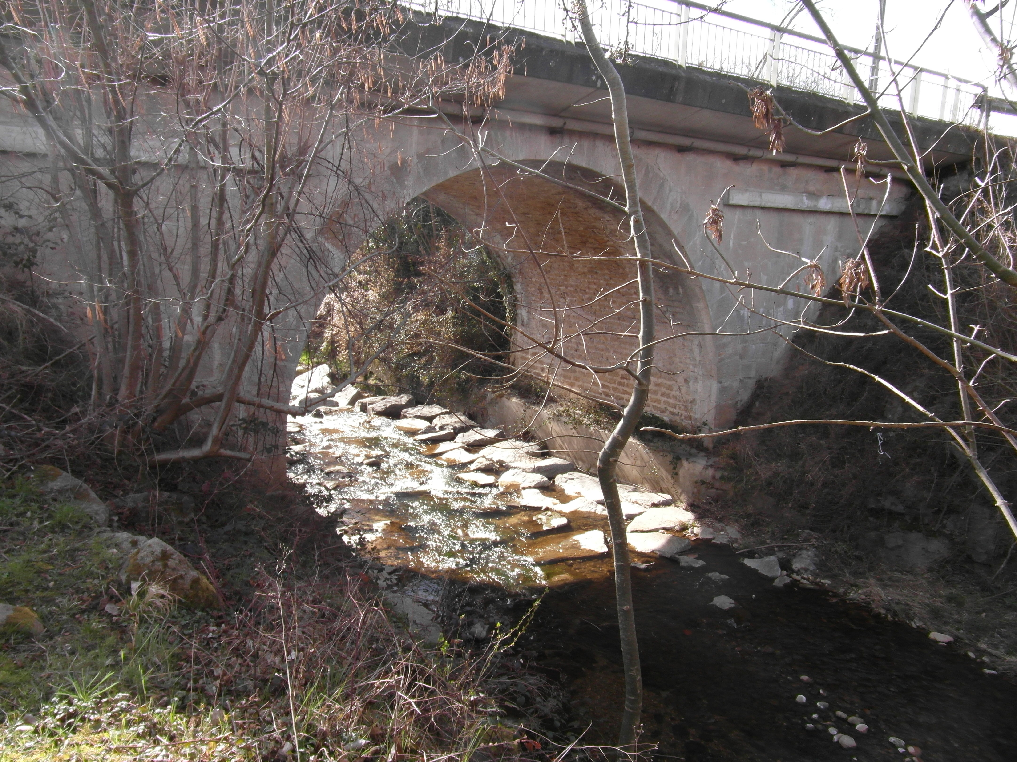 La Varèze près de Cour-et-Buis en mars 2019